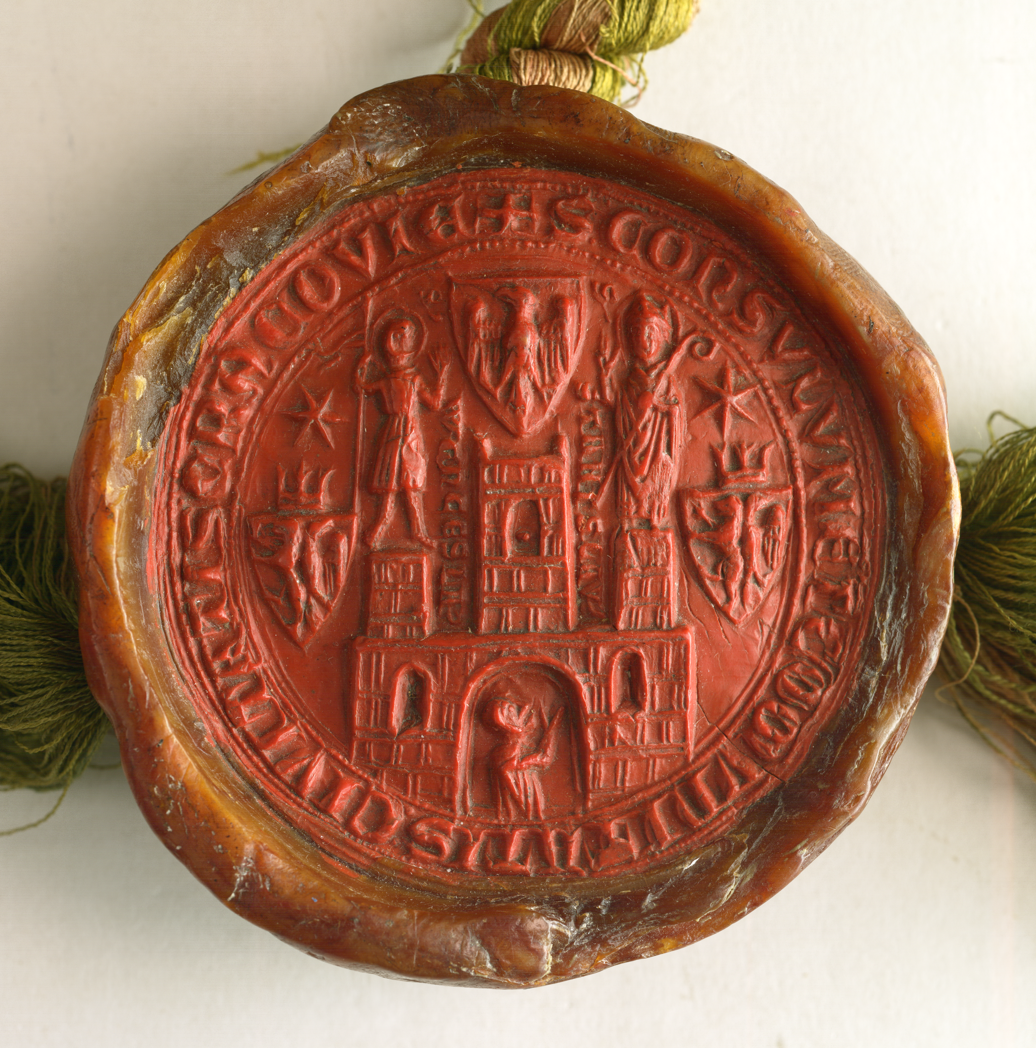 Pieczęć miasta Krakowa na sznurze rudo-zielonym odciśnięta w czerwonym wosku przy dokumencie z 1425 r. Legenda: + S CONSVLVM ET COMUNITATIS CIVITATIS CRACOVIE. W polu pieczęci brama miejska o 3 basztach. Nad środkową tarcza z orłem na bocznych św. Wacław i św. Stanisław. Po bokach dwie tarcze z herbem kujawskim a nad nimi korony, powyżej których jeszcze gwiazdy. W dolnej bramie klęcząca postać w pozie modlitewnej.